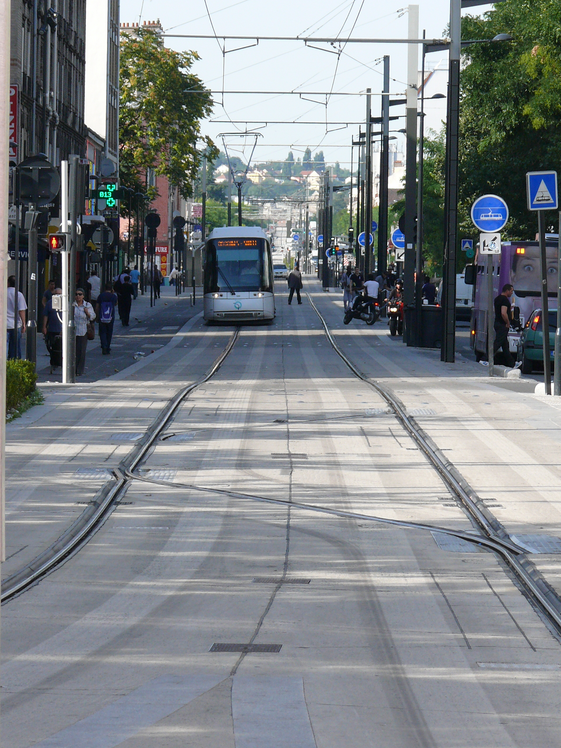 Plate-forme du tramway, rue Gabriel-Péri à Saint-Denis